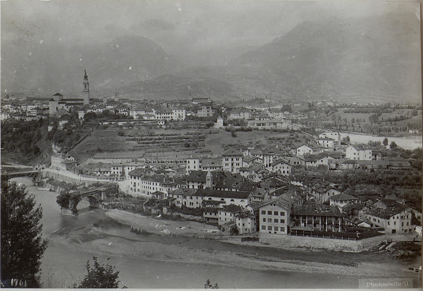 Belluno.Totalansicht.